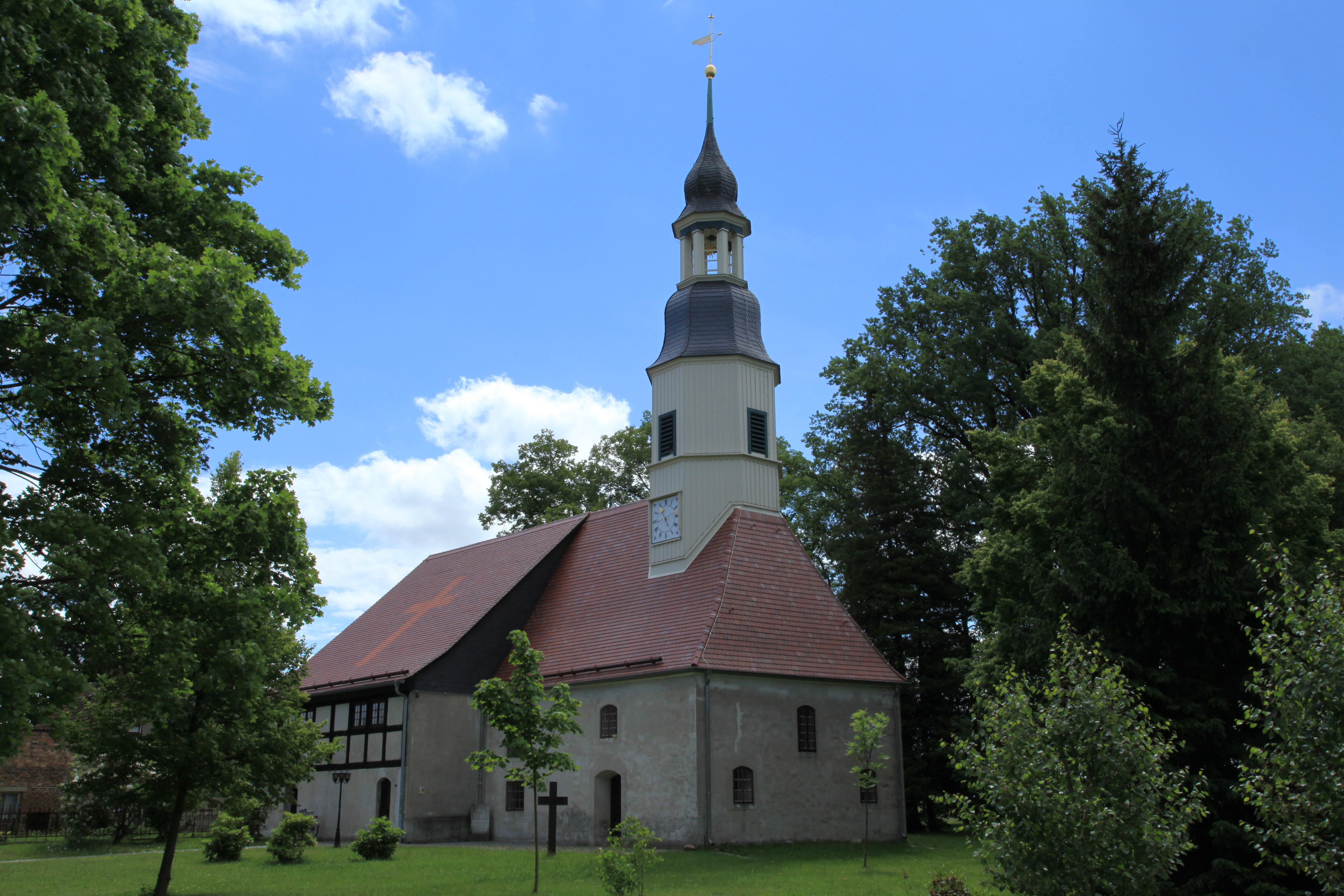 Kirche Kosel, Krebaer Straße in Kosel, Niesky